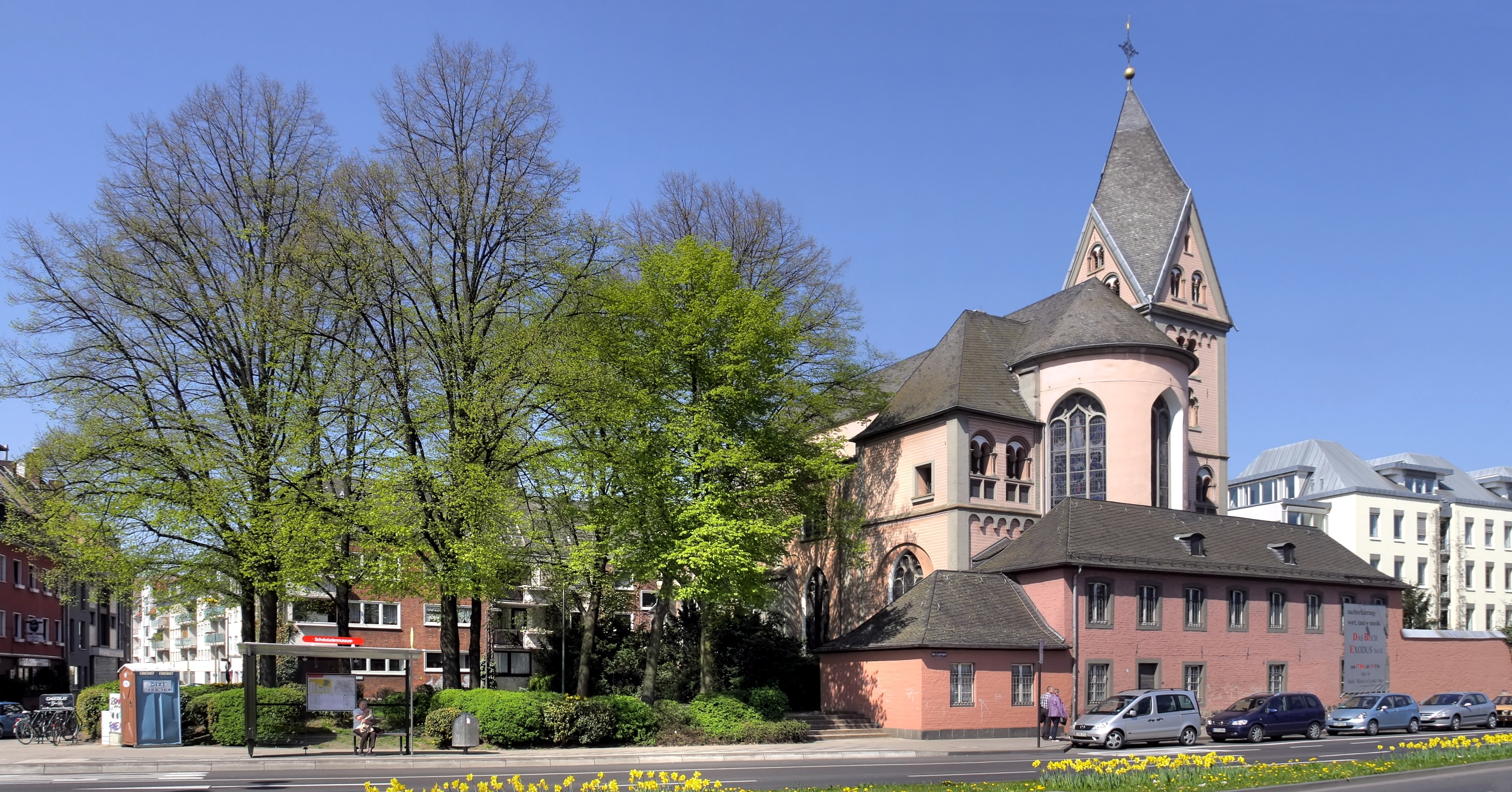 St. Maria in Lyskirchen, Ansicht von der Rheinseite. This is a photograph of an architectural monument.